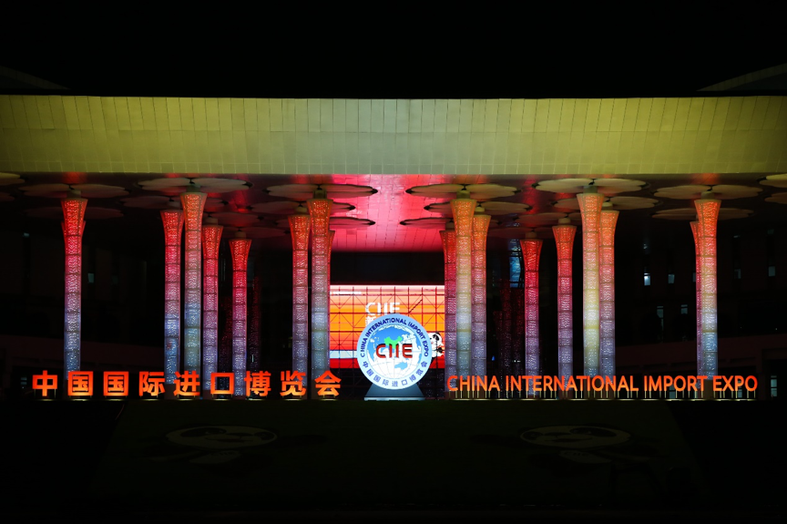 10月12日星空下的“国展中心”